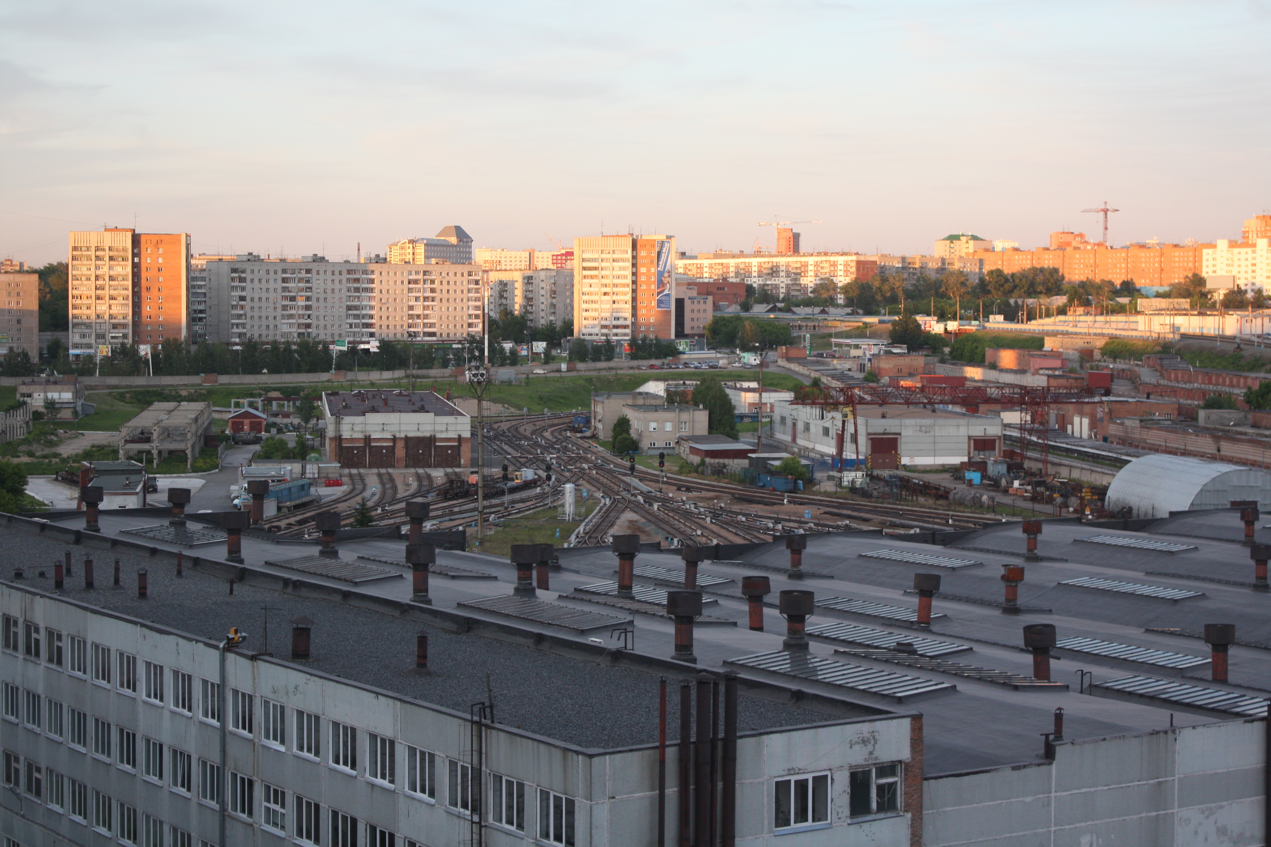 Ельцовское метродепо